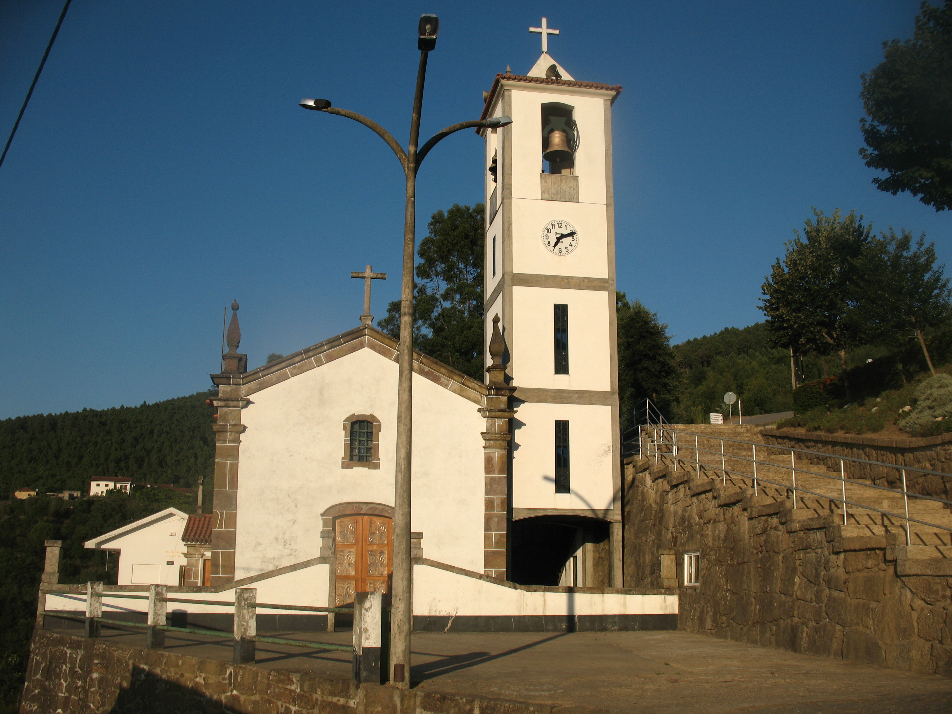 Amarante Rebordelo Igreja Matriz